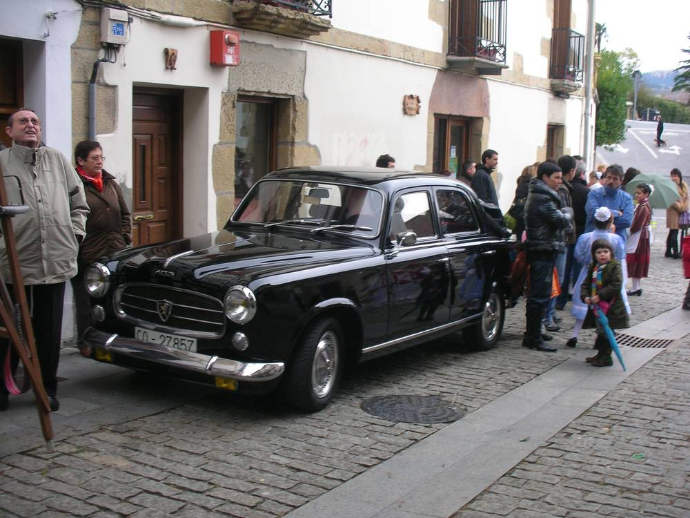 Peugeot 403 bat Oiartzungo kaleetan, Inude eta Artzainen jai egunean. 1950-60 urte tarteetako sedan modeloa seguruenik.